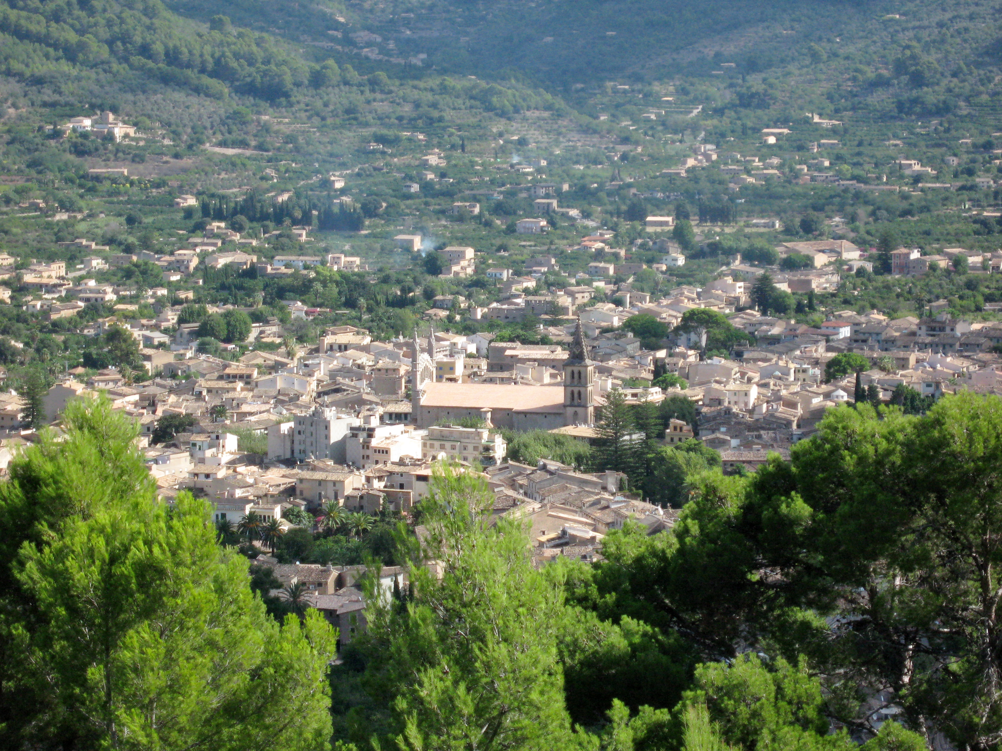 Sóller, Mallorca, Spanien